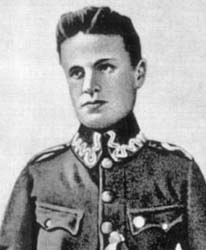 Zygmunt Janiszewski, polski matematyk, żołnierz Legionów Polskich. Profesor matematyki Uniwersytetu Warszawskiego.